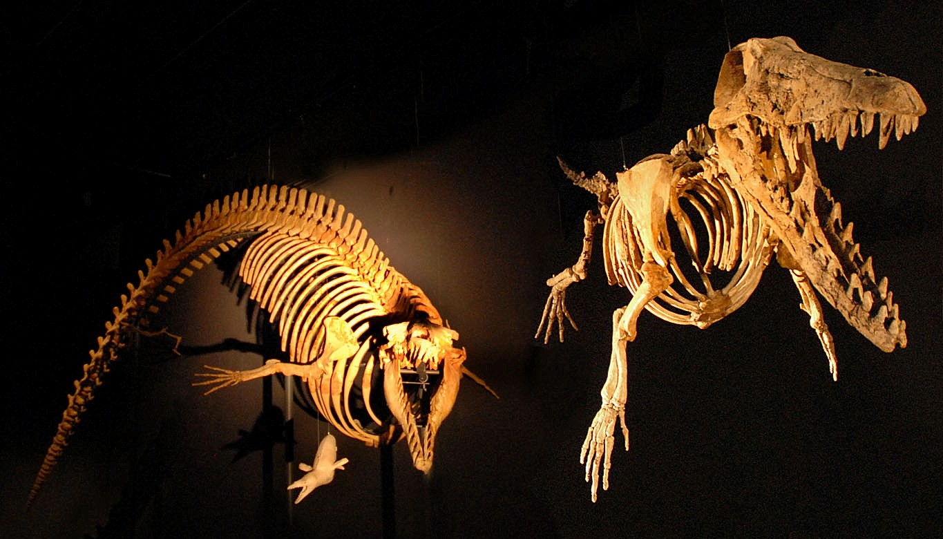 Les ancêtres des cétacés A droite "Ambulocetus natans", le "cétacé marcheur qui nage" est la forme intermédiaire entre les mammifères terrestres et les cétacés actuels. A gauche, "Cynthiacetus", un cétacé totalement inféodé au milieu aquatique, avec des pattes arrières atrophiées. Exposition "Incroyables Cétacées" Grande Galerie de l'Evolution Museum National d'Histoire Naturelle (Paris)